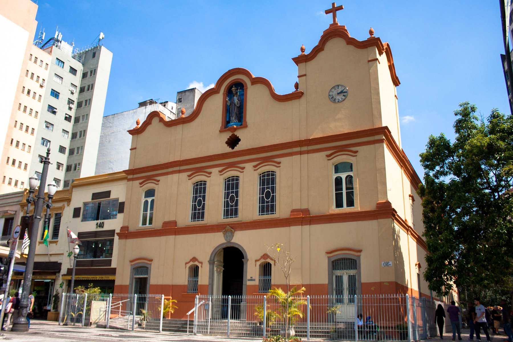 Igreja de São Gonçalo - São Paulo, Brasil, 2016 - Foto: RAOOS